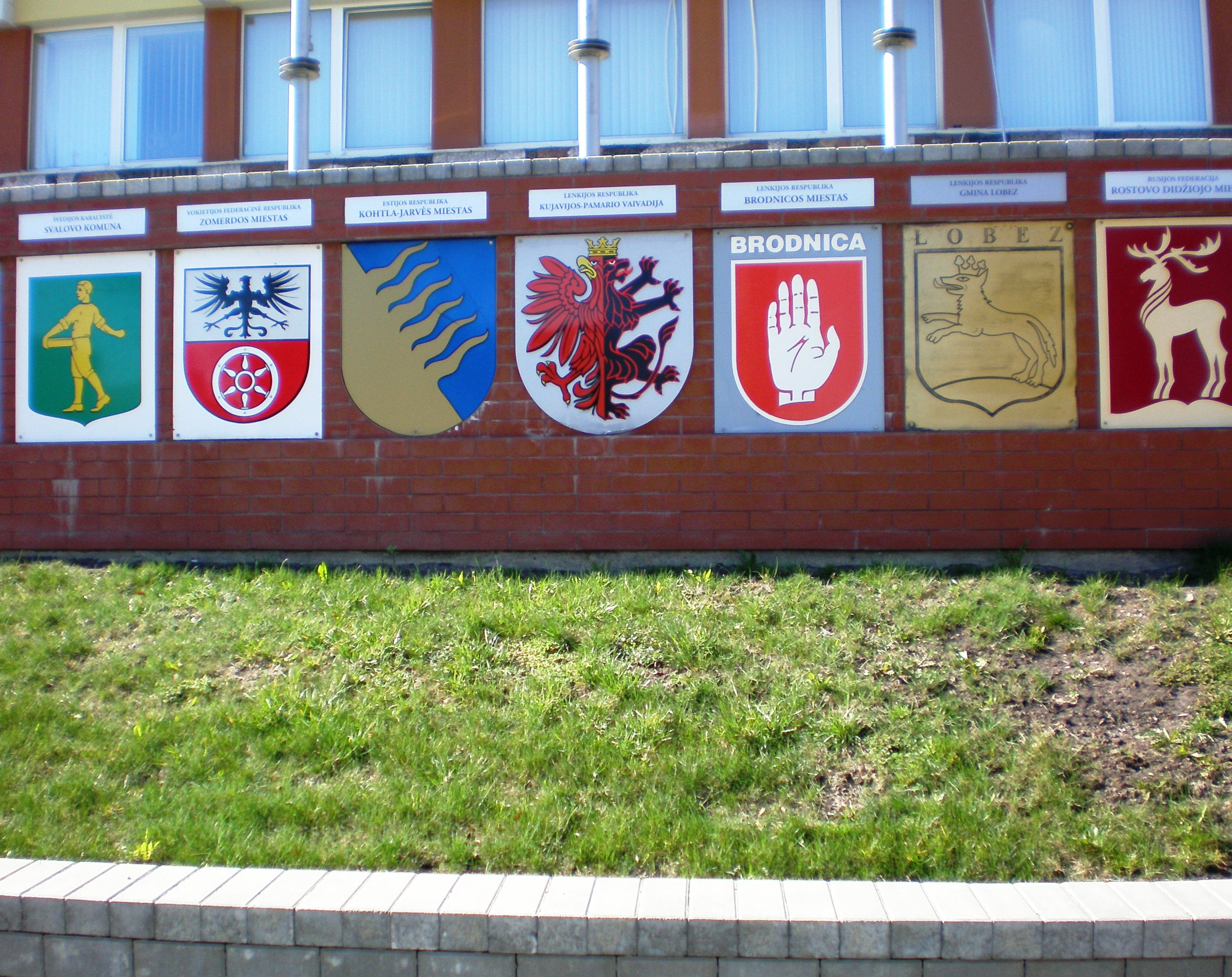 Giminingi miestai su Kėdainiais